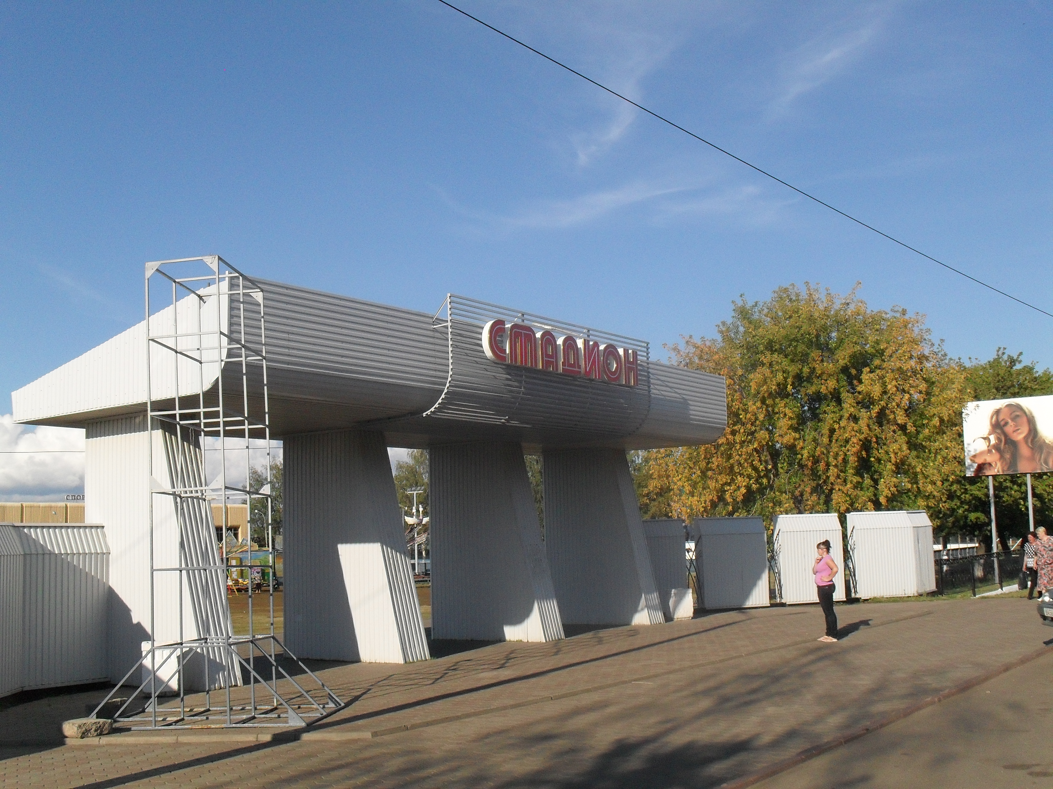 Чистопольский стадион на улице Энгельса